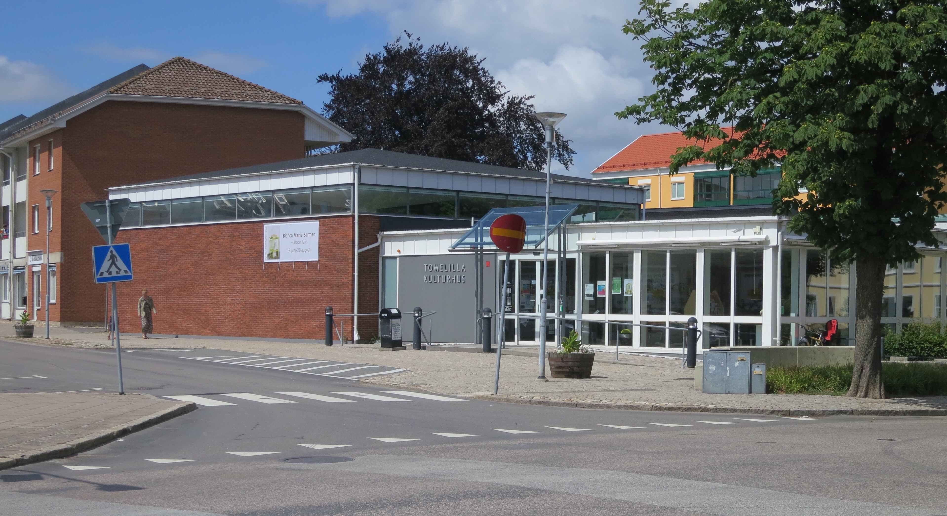 Tomelilla kulturhus 2016